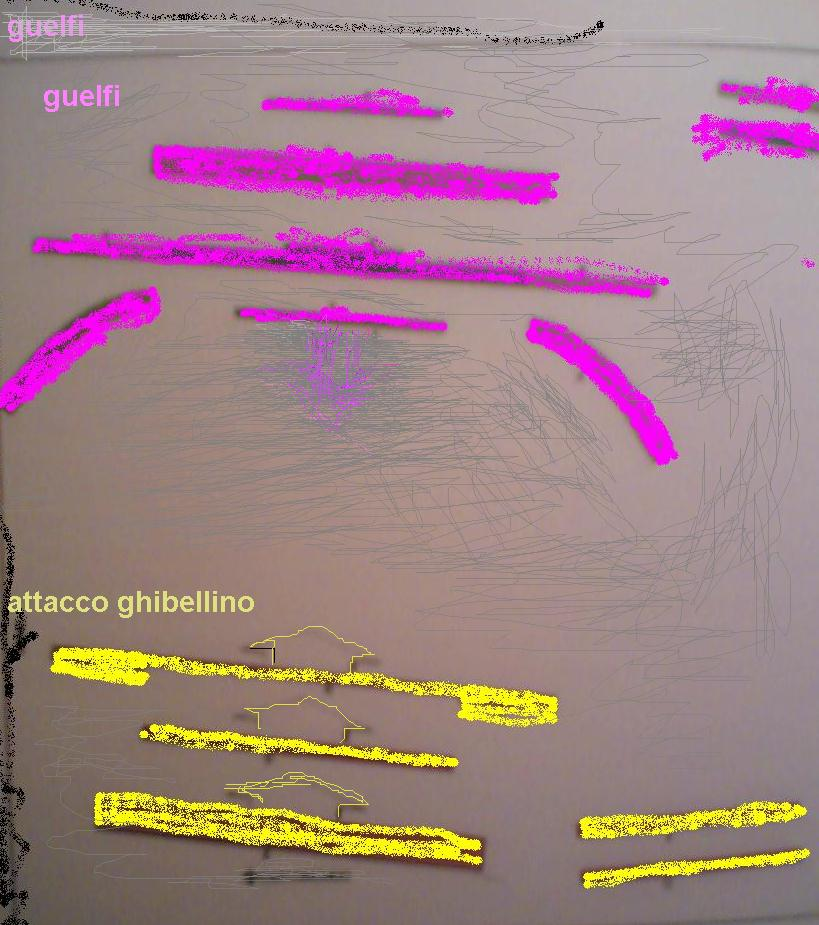 libera commons art di carlomarinobuttazzo pubblico dominio ). Template Creative Commons BY-SA